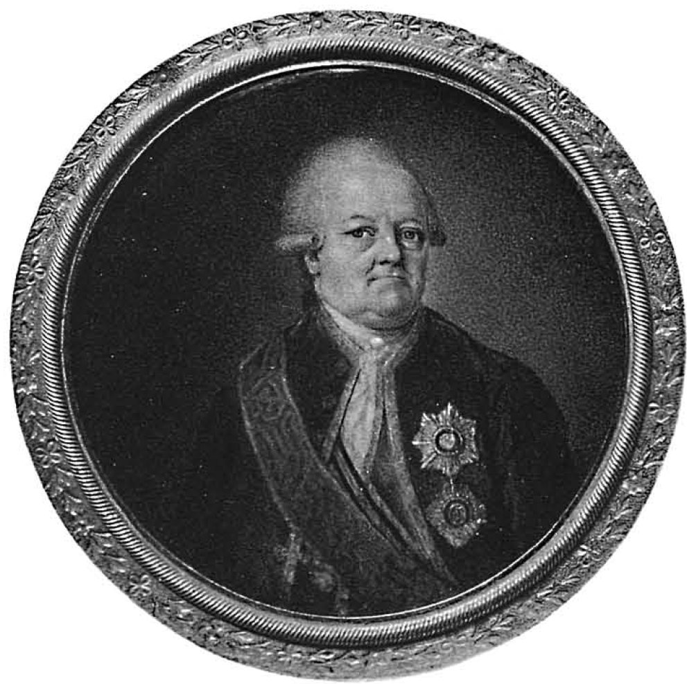 Граф Пётр Иванович Панин (1721-1789). Данный рисунок был также использован для иллюстрирования статьи «Панин, Петр Иванович, граф» опубликованной в семнадцатом томе «Военной энциклопедии», который был издан книгоиздательским товариществом Ивана Дмитриевича Сытина в 1914 году в столице Российской империи городе Санкт-Петербурге. Подробное описание к этой фотографии можно прочесть в указанной выше статье на сайте Русской Викитеки.